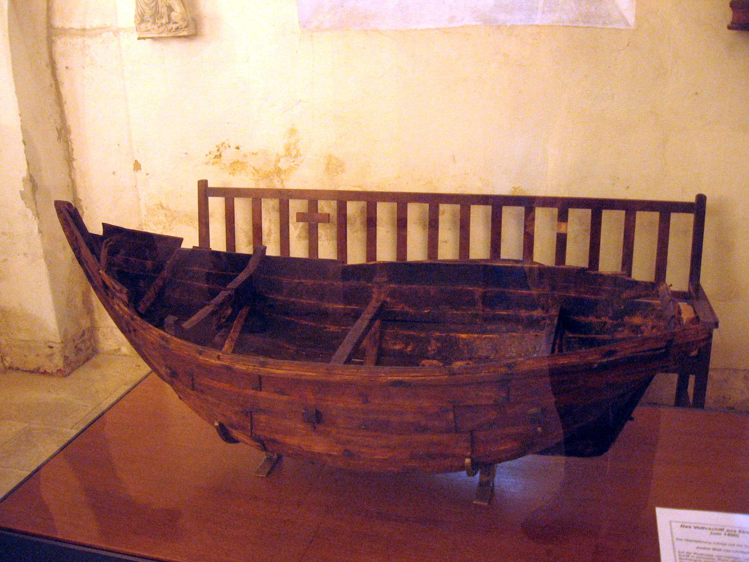 Das Modell der Kogge in der Stiftskirche Ebersdorf bei Chemnitz